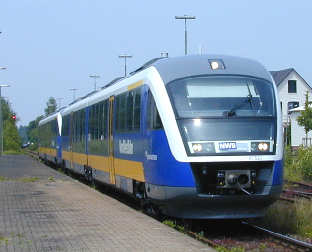 NWB treinstel VT 561 op 26 juni 2001 te Rastede